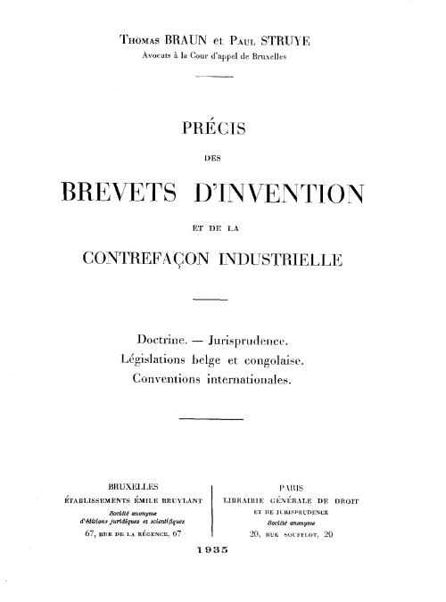 Livre : Précis des brevets d'invention et de la contrefaçon indutrielle - Thomas Braun- Paul Struye 1935